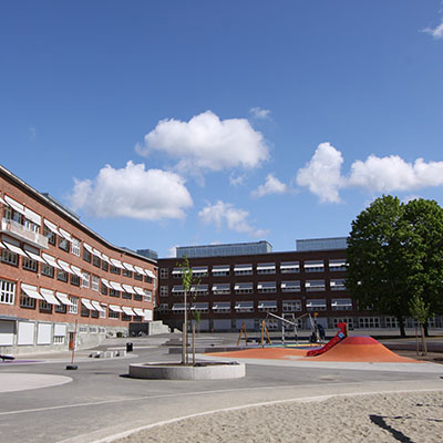 Skolebygg sett fra nedre del av store skolegård